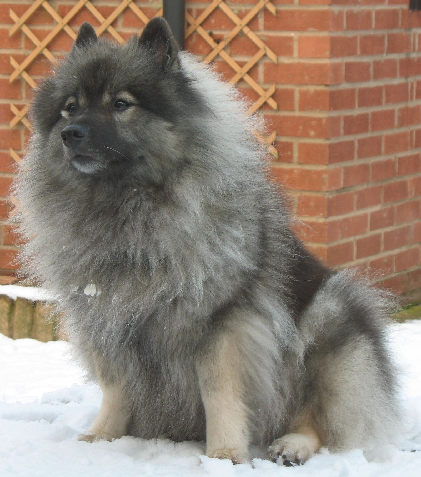 Keeshond